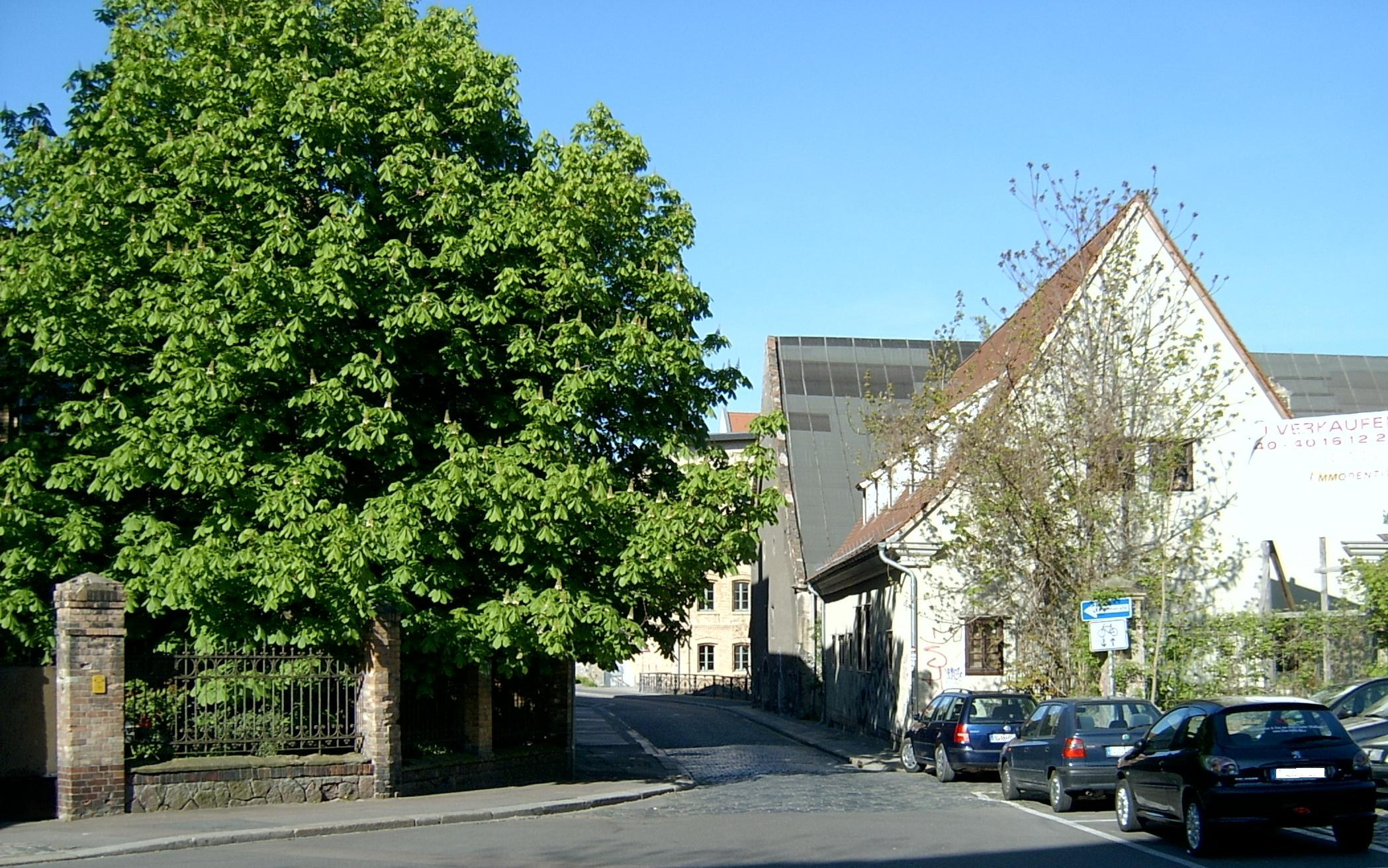 Die Mühlpforte in Halle (Saale)